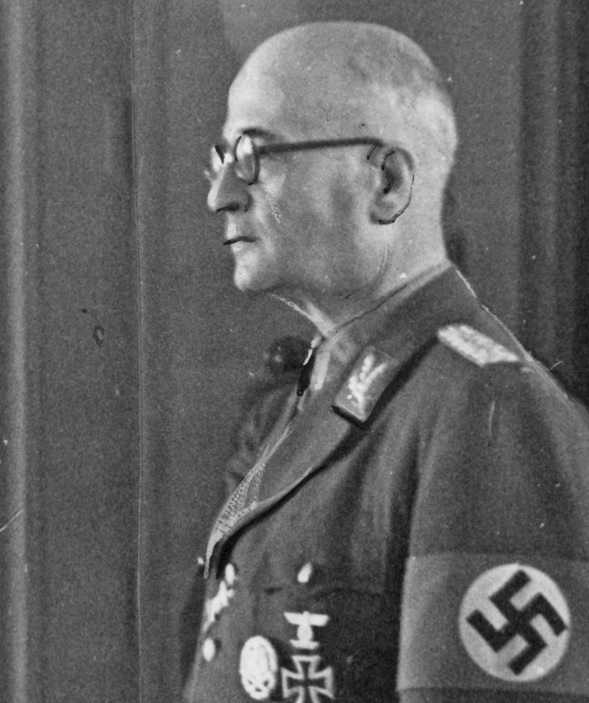 gubernator dystryktu Kraków